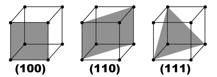 Zeigt die Miller-Indizes für Ebenen.